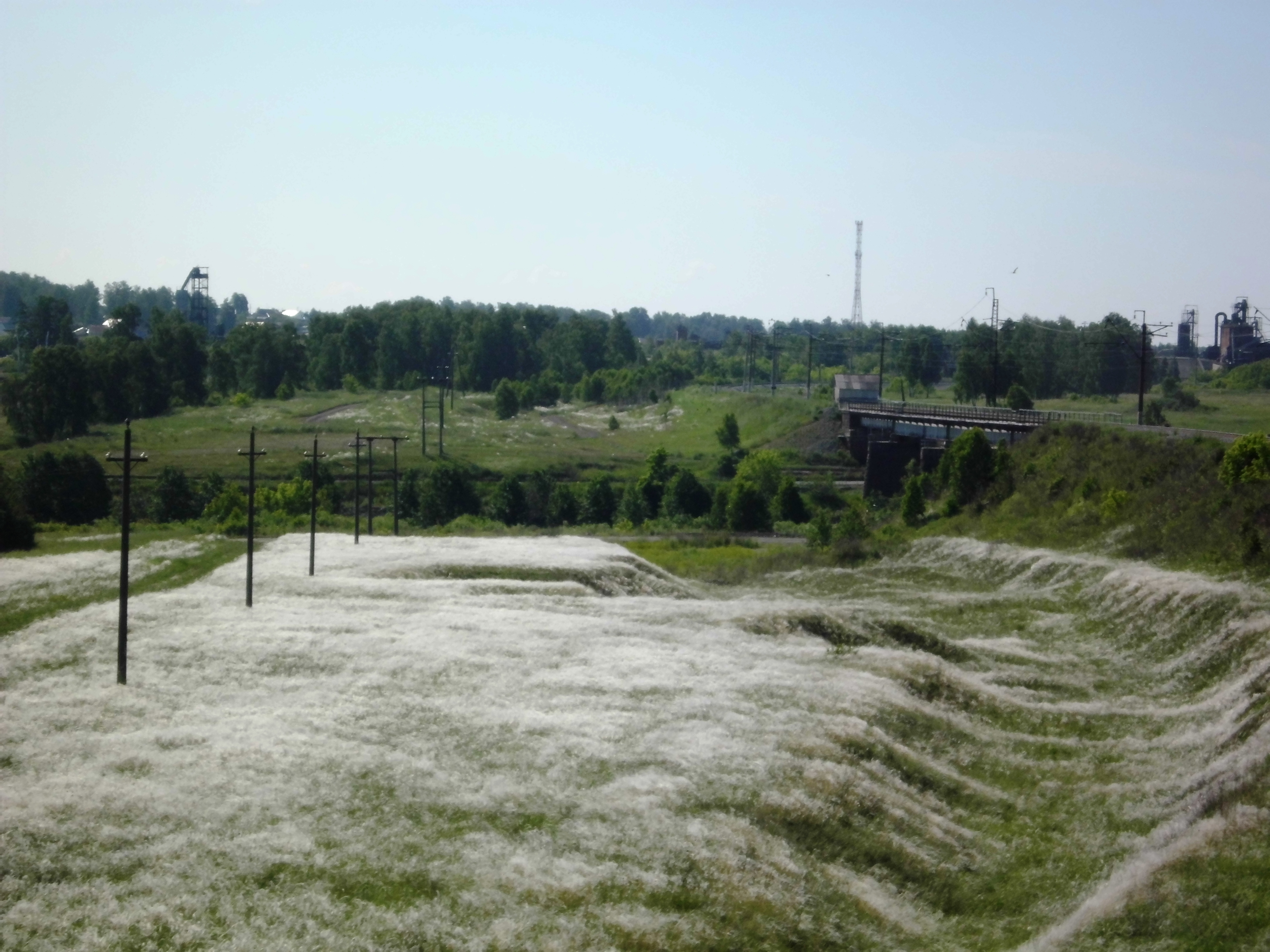 Железнодорожный мост на линии Чурилово - Каменск-Уральский (на участке между станциями Муслюмово и Кунашак) через реку Течу возле посёлка Муслюмово Кунашакского района Челябинской области. На ближнем плане на левом берегу реки белым отсвечивает цветущий Ячмень гривастый